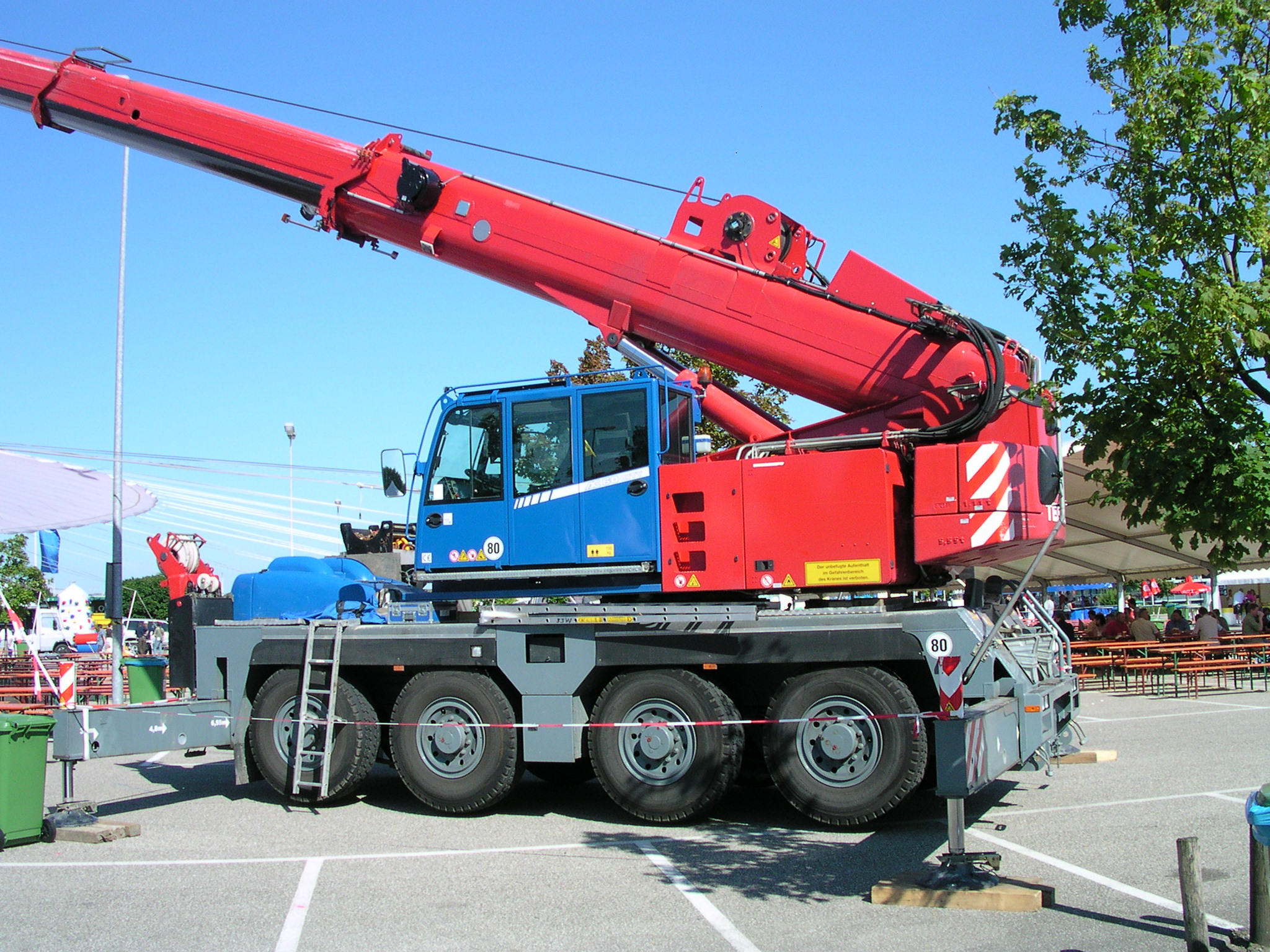 Terex-Demag AC60 Telekopkran, der in Wörth am Rhein beim Oldtimer-Treffen bei Daimler-Chrysler eingesetzt wurde